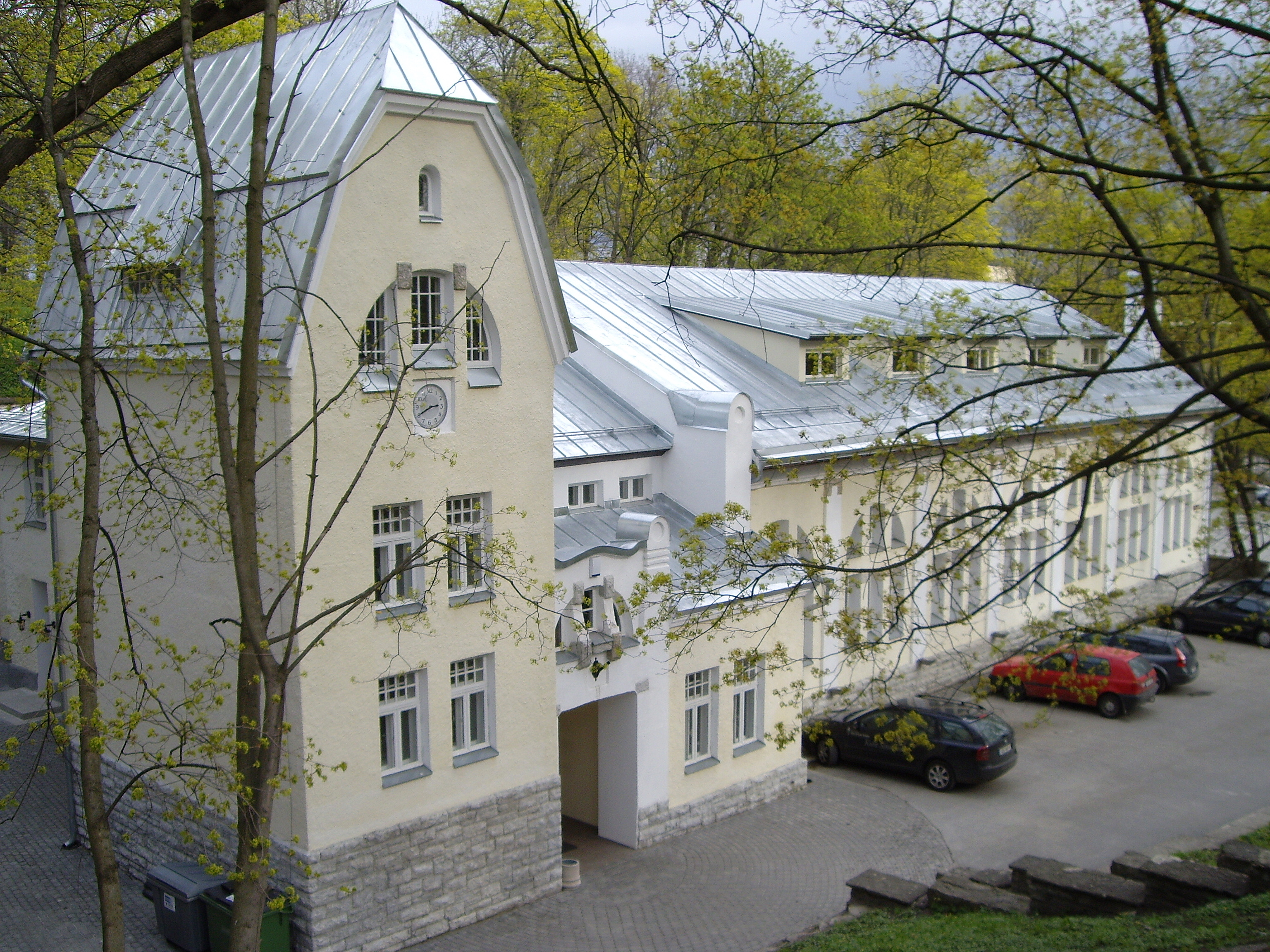 EKNK Keskus, Toompea 3